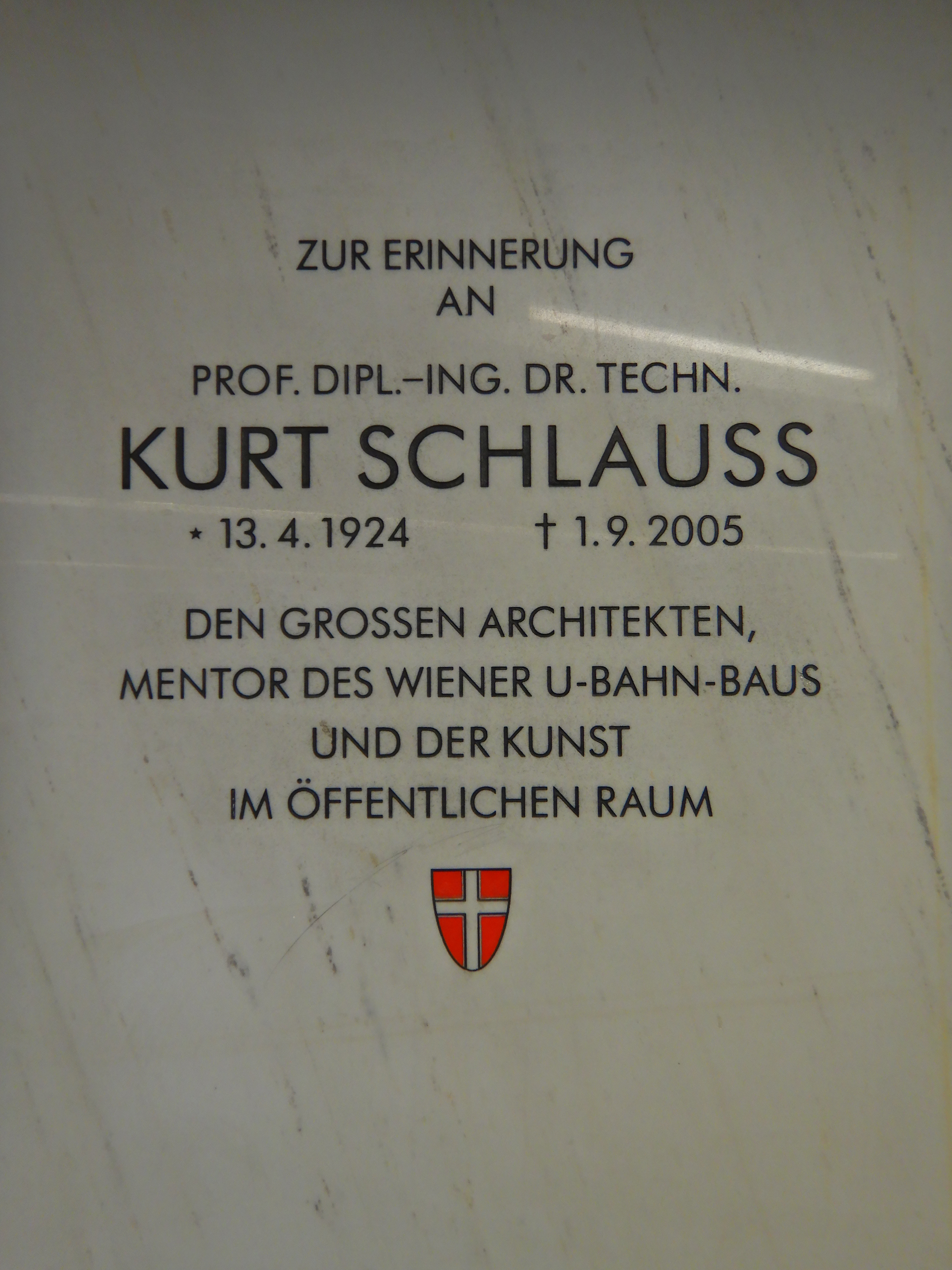 Gedenktafel für Kurt Schlauss (Wien, Karlsplatz, U-Bahnpassage, Abgang bei der Secession)